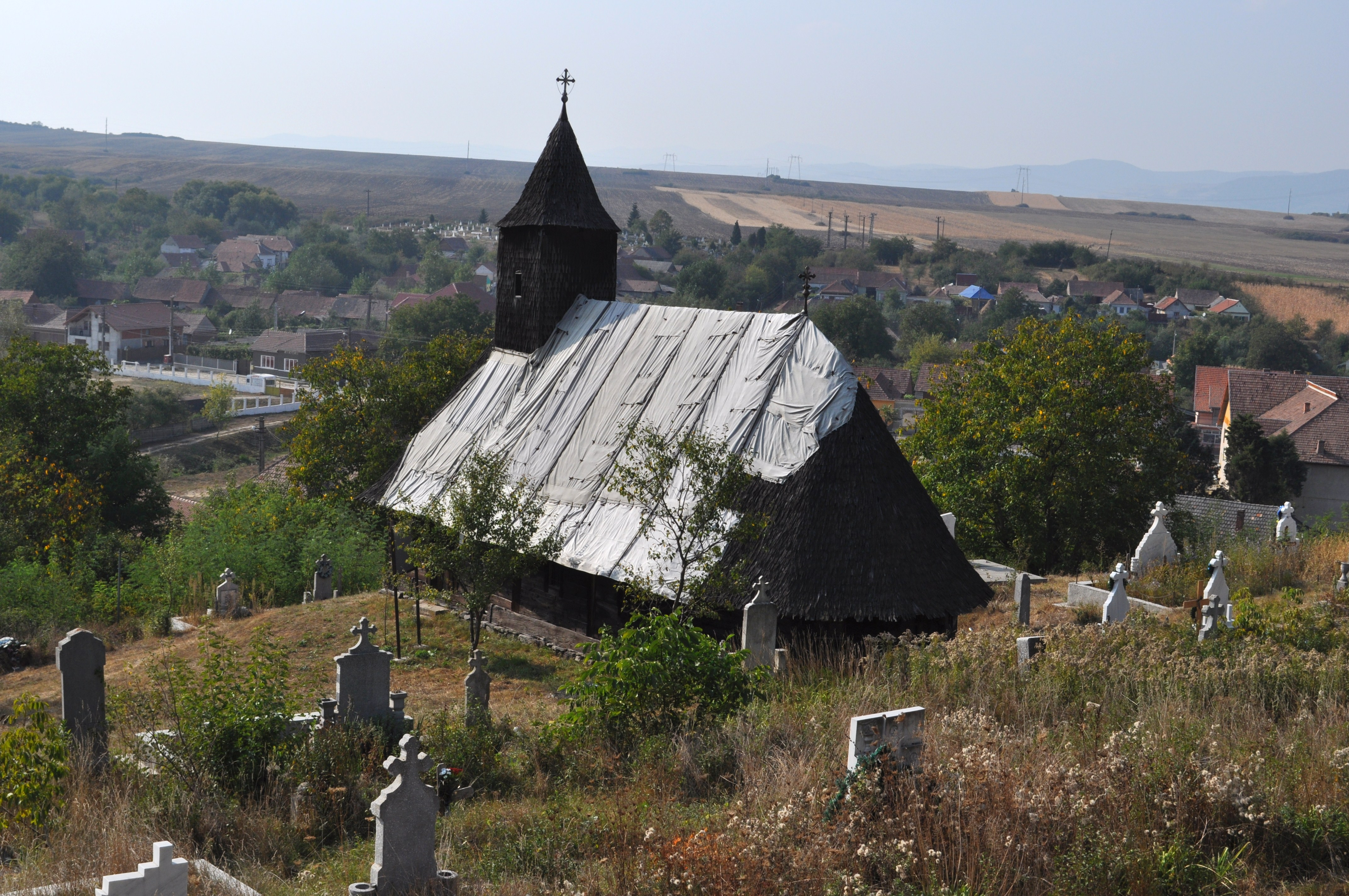 Biserica de lemn „Sfinții Arhangheli” din Săliștea, județul Alba